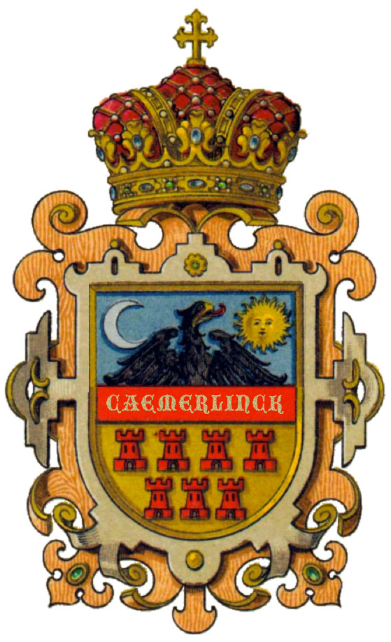 Wapenschild van de familie Caemerlinck